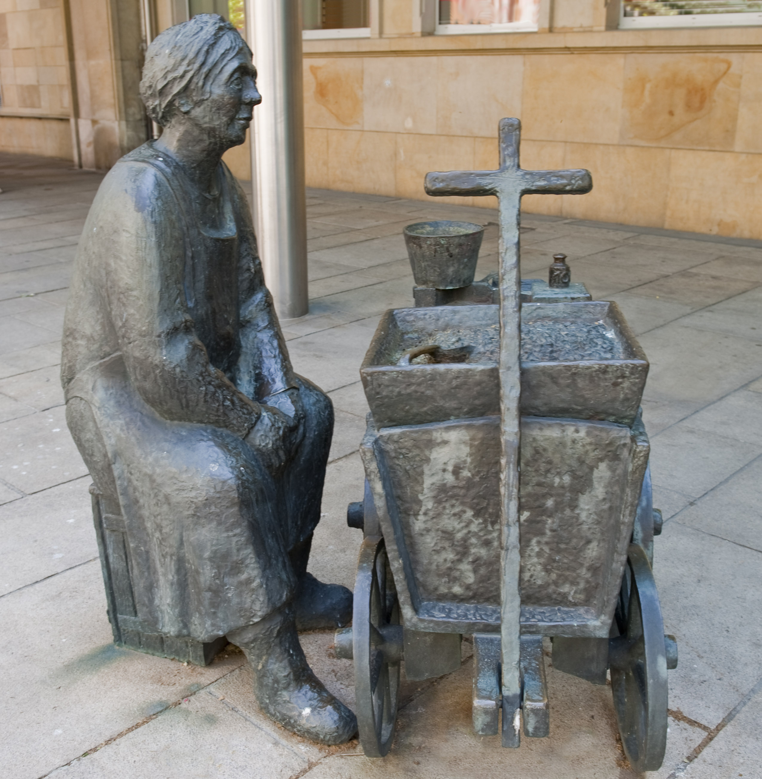 Granatfrau, sculpture by Gerhard Olbrich, exhibited in Bremerhaven, Germany Anfang November 1987 wurde die Granatfrau, gestiftet von der Städtischen Sparkasse, der Stadt Bremerhaven übergeben und in der Fußgängerzone Bürger vor dem Haupteingang der Sparkasse aufgestellt. Als Vorbild diente die Granatfrau Meta Matschuk; Material Kupfer-Zinn-Bronze; Gewicht: ca 1 Tonne. Zur Übergabe verkauften Sparkassendirektor Harold Virkus und Oberbürgermeister Karl Willms Krabben zu Nostalgie-Preisen.